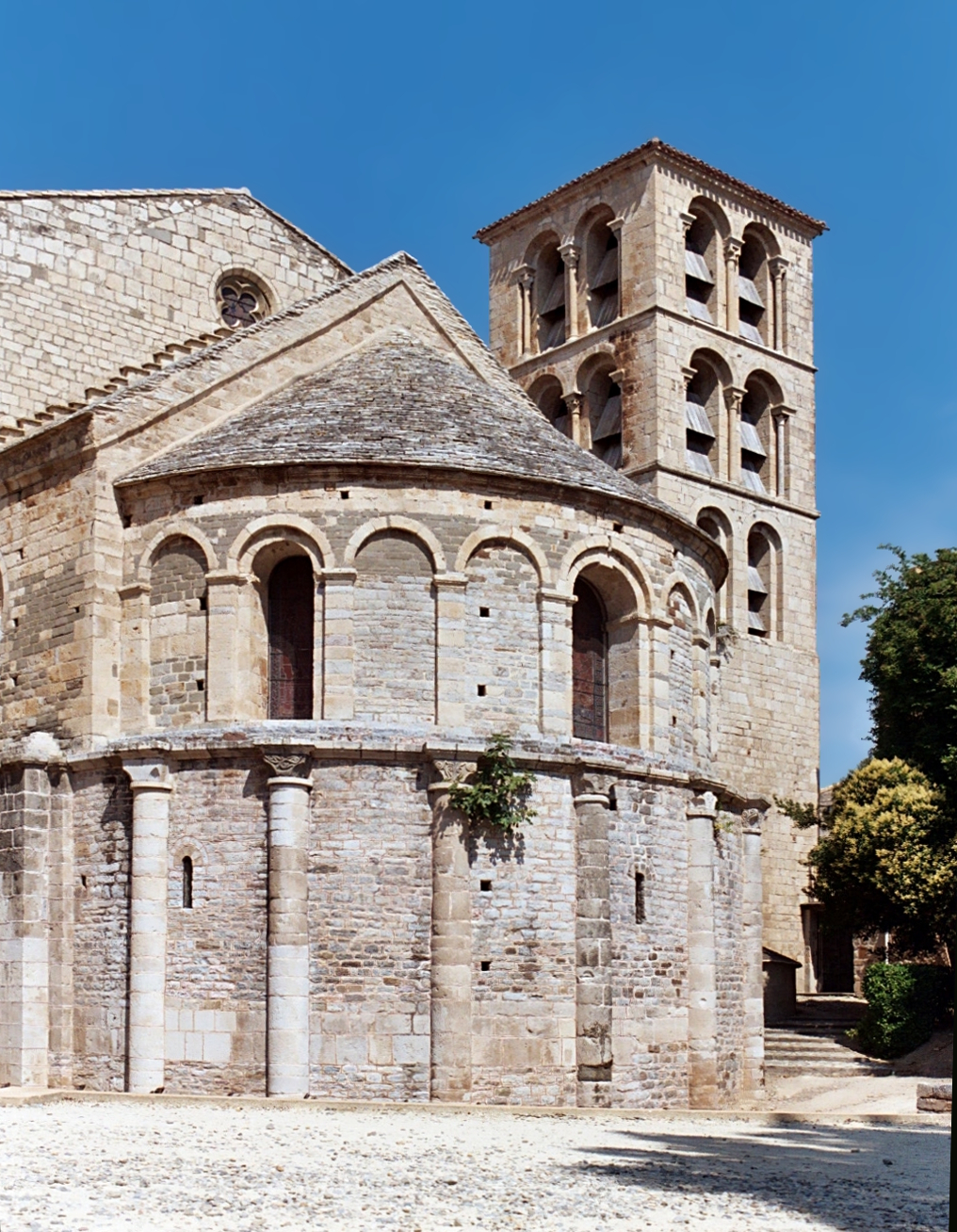 France - Languedoc - Aude - Abbaye de Caunes-Minervois